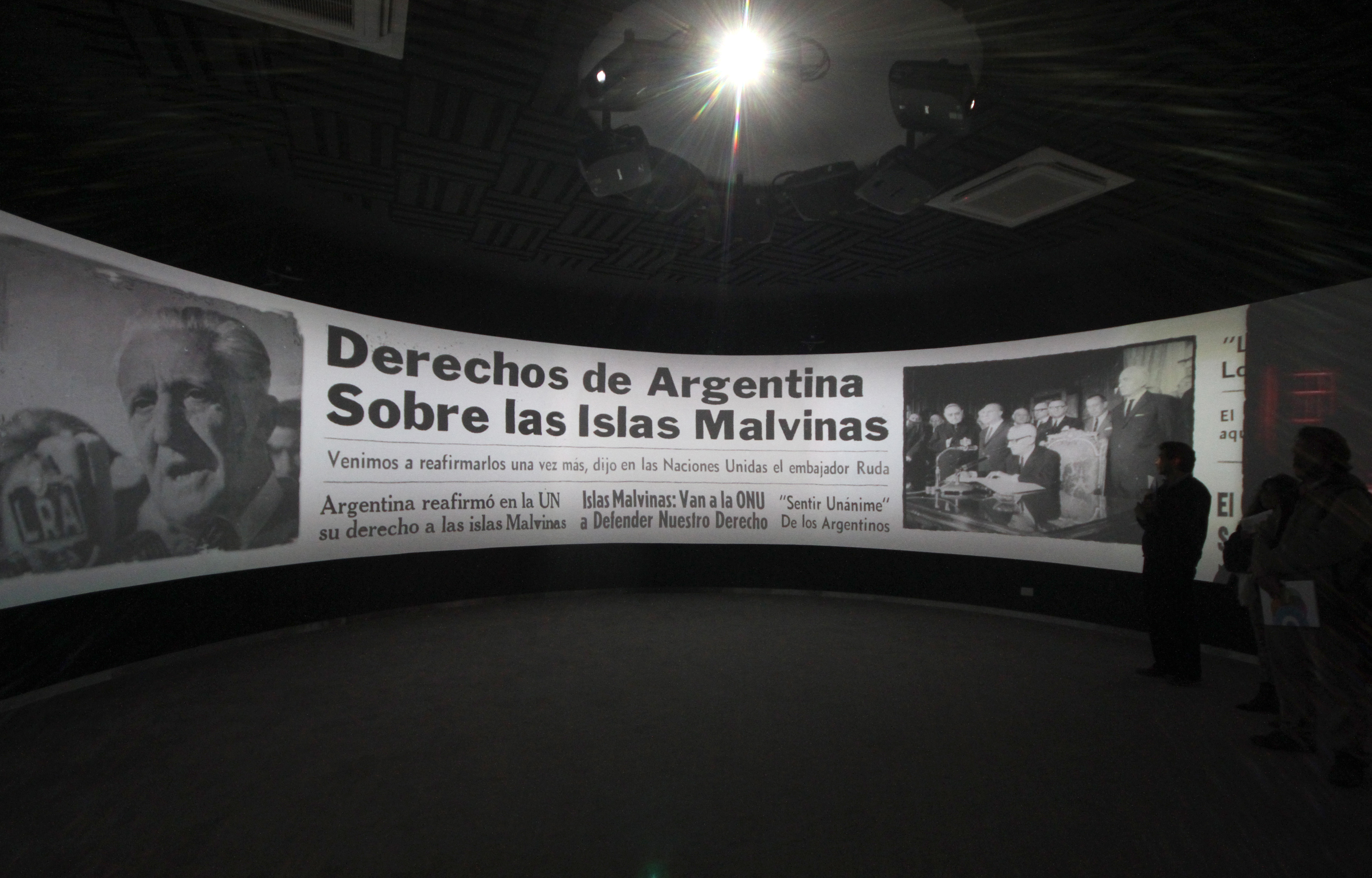 Buenos Aires, 8 de Agosto de 2014 En el Museo Malvinas e Islas del Atlántico Sur, se realizó un recorrido especial para prensa, guiado por el director del museo, Jorge Giles; el subdirector, Mario Volpe (excombatiente de Malvinas); Juan Rattenbach, jefe de guías y nieto de Benjamín (responsable del conocido informe) y Silvina Gutiérrez, bióloga y subdirectora del área de Flora y Fauna. Fotos: Silvina Frydlewsky / Ministerio de Cultura de la Nación